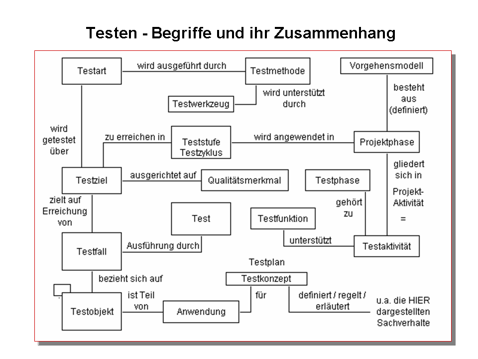 Begriffe zu 'TESTEN' und ihr Zusammenhang. Der den Zusammenhang beschreibende Text ist aus Sicht des 'ersten' Begriffs formuliert und steht LINKS von der Linie, die (aus seiner Sicht) zum zweiten Begriff führt.